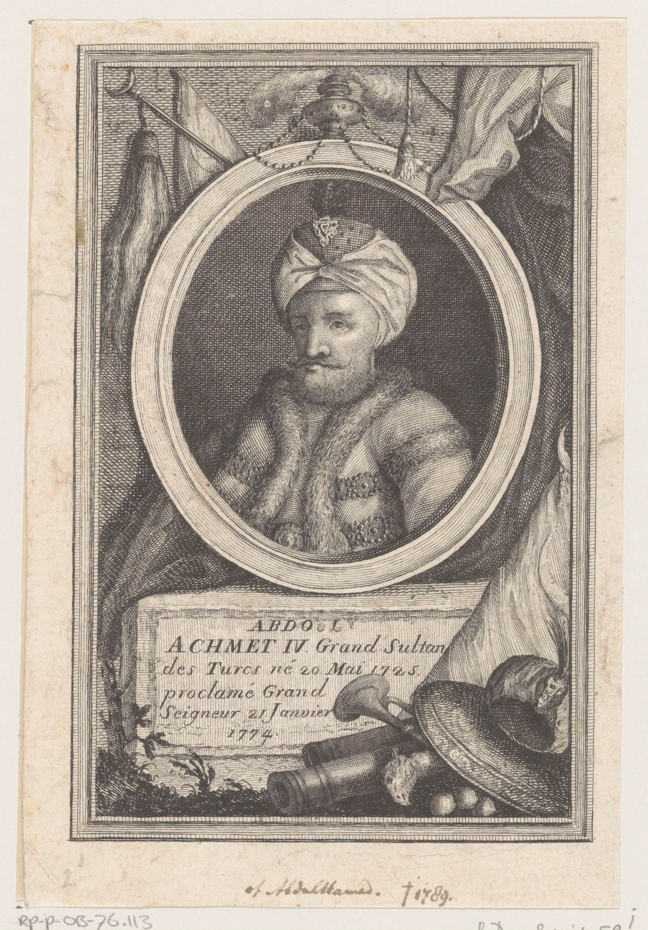 IdentificatieTitel(s): Portret van Abdülhamid I, sultan van het Ottomaanse RijkObjecttype: prent Objectnummer: RP-P-OB-76.113Omschrijving: Portret van Abdülhamid I in een ovale omlijsting. Hij draagt een tulband. Daar omheen een aantal allegorische objecten. In een kader zes regels Franse tekst.VervaardigingVervaardiger: prentmaker: anoniemDatering: 1800 - 1899Fysieke kenmerken: gravure en etsMateriaal: papier Techniek: graveren (drukprocedé) / etsenAfmetingen: blad: h 172 mm (binnen plaatrand afgesneden) × b 115 mm (binnen plaatrand afgesneden)OnderwerpWat: head-gear: turbanWie: Abdülhamid I (sultan van het Ottomaanse Rijk)Verwerving en rechtenVerwerving: onbekend 1997Copyright: Publiek domein